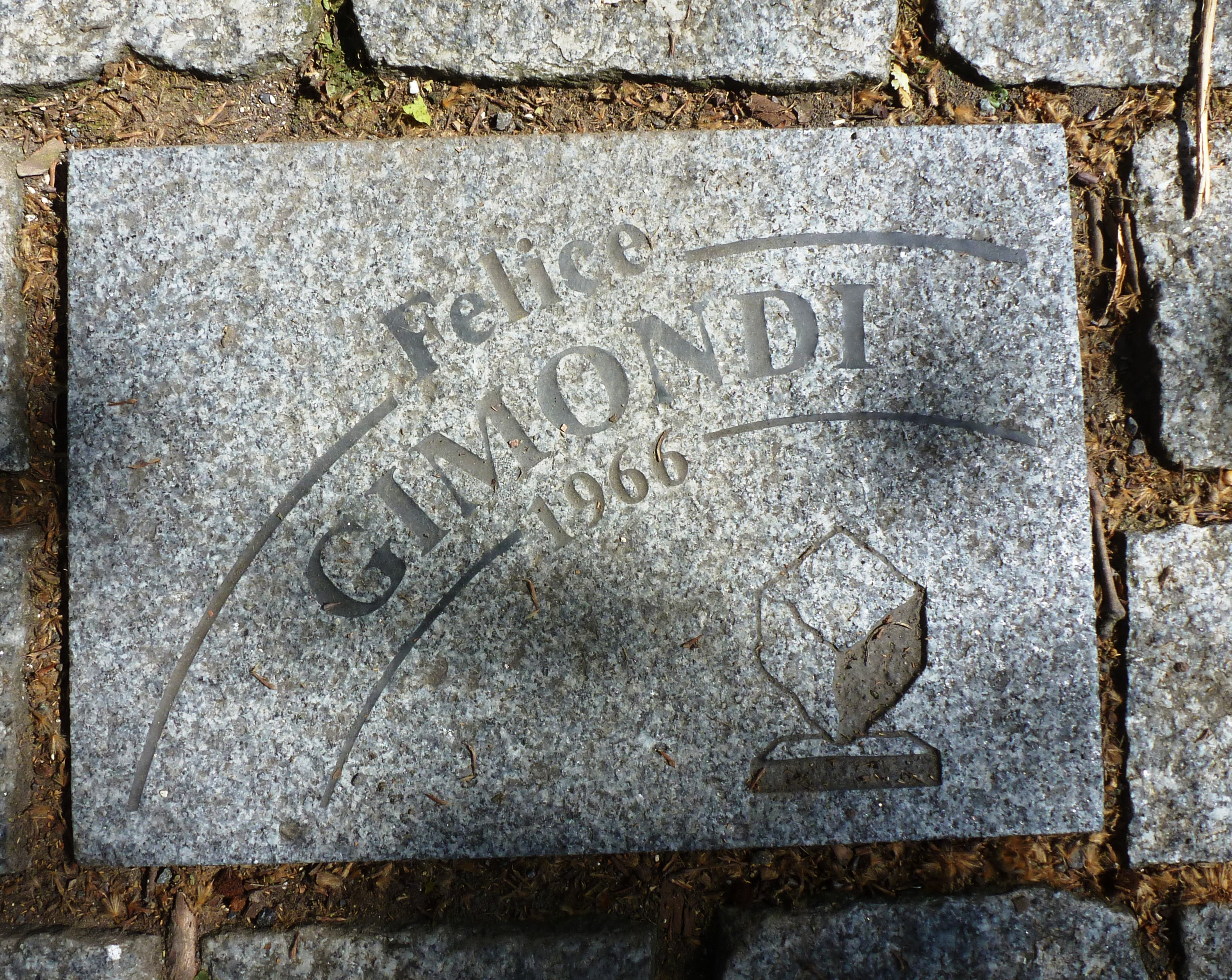 Pflasterstein für Felice Gismondi auf der Allée Charles Crupelandt in Roubaix